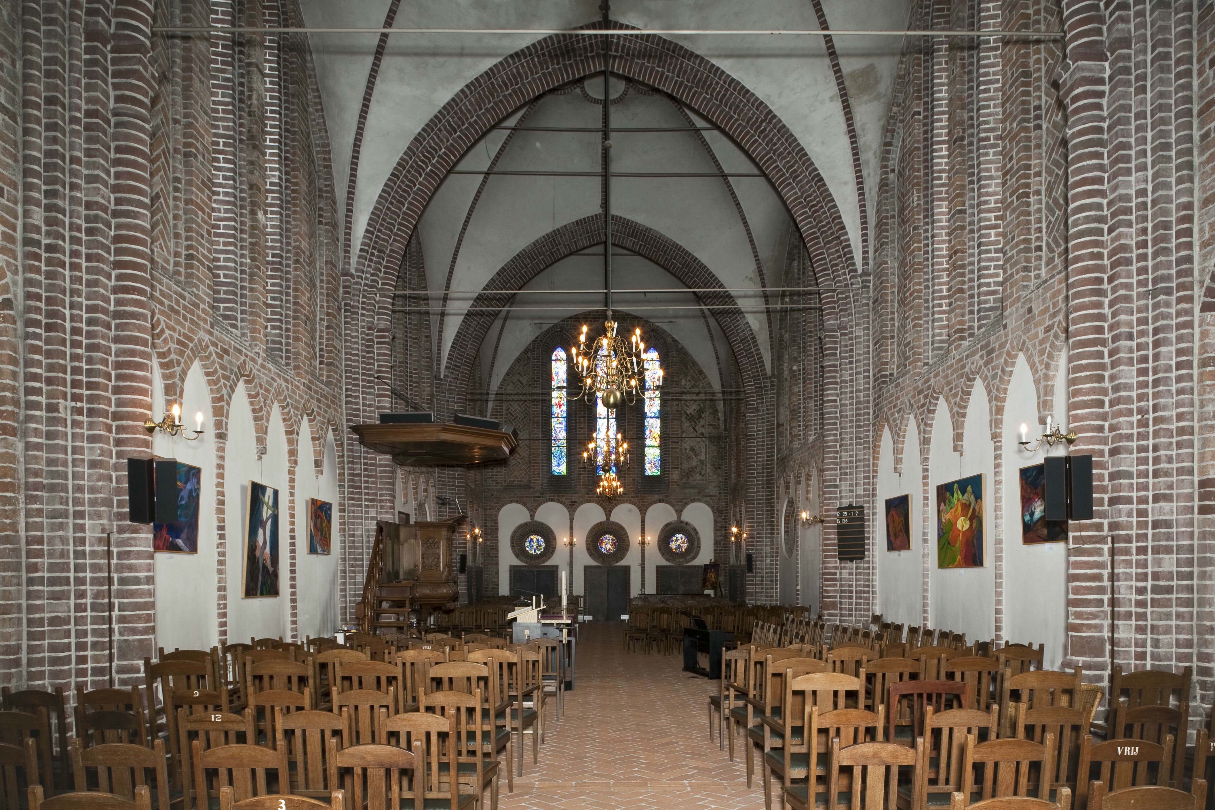 Nederlands Hervormde Kerk: Overzicht van het interieur met preekstoel en de glas-in-loodramen in het koor, naar het oosten gezien